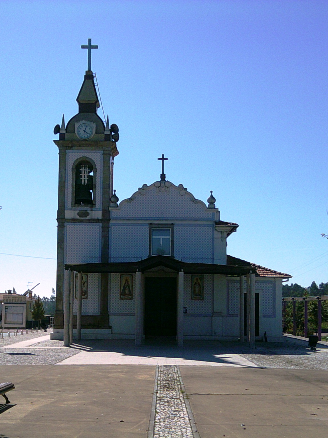 Capela de Nossa Senhora do Desterro, freguesia de Arada, concelho de Ovar, distrito de Aveiro, Portugal.